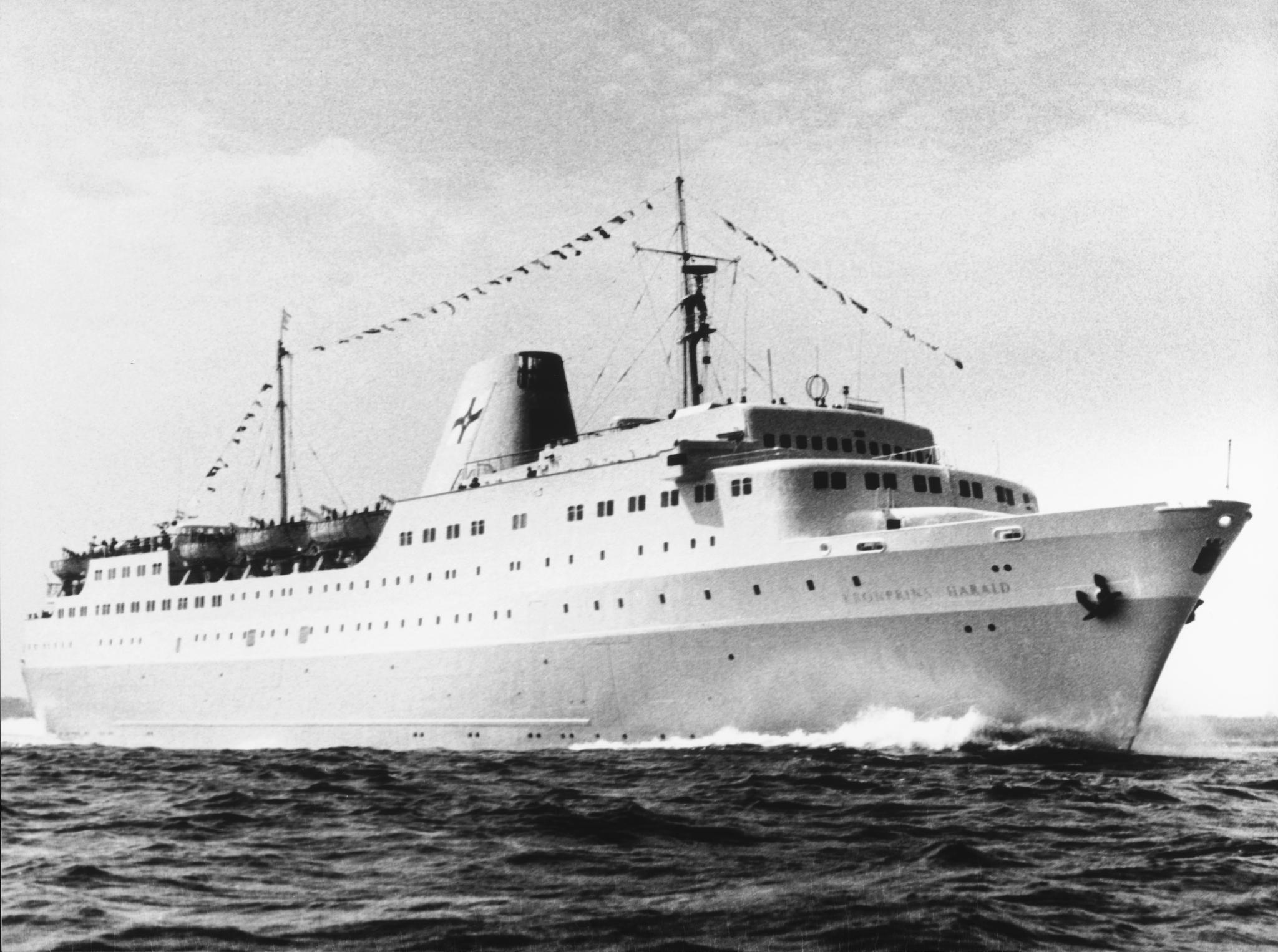 M/S Kronprins Harald (1961-1975)